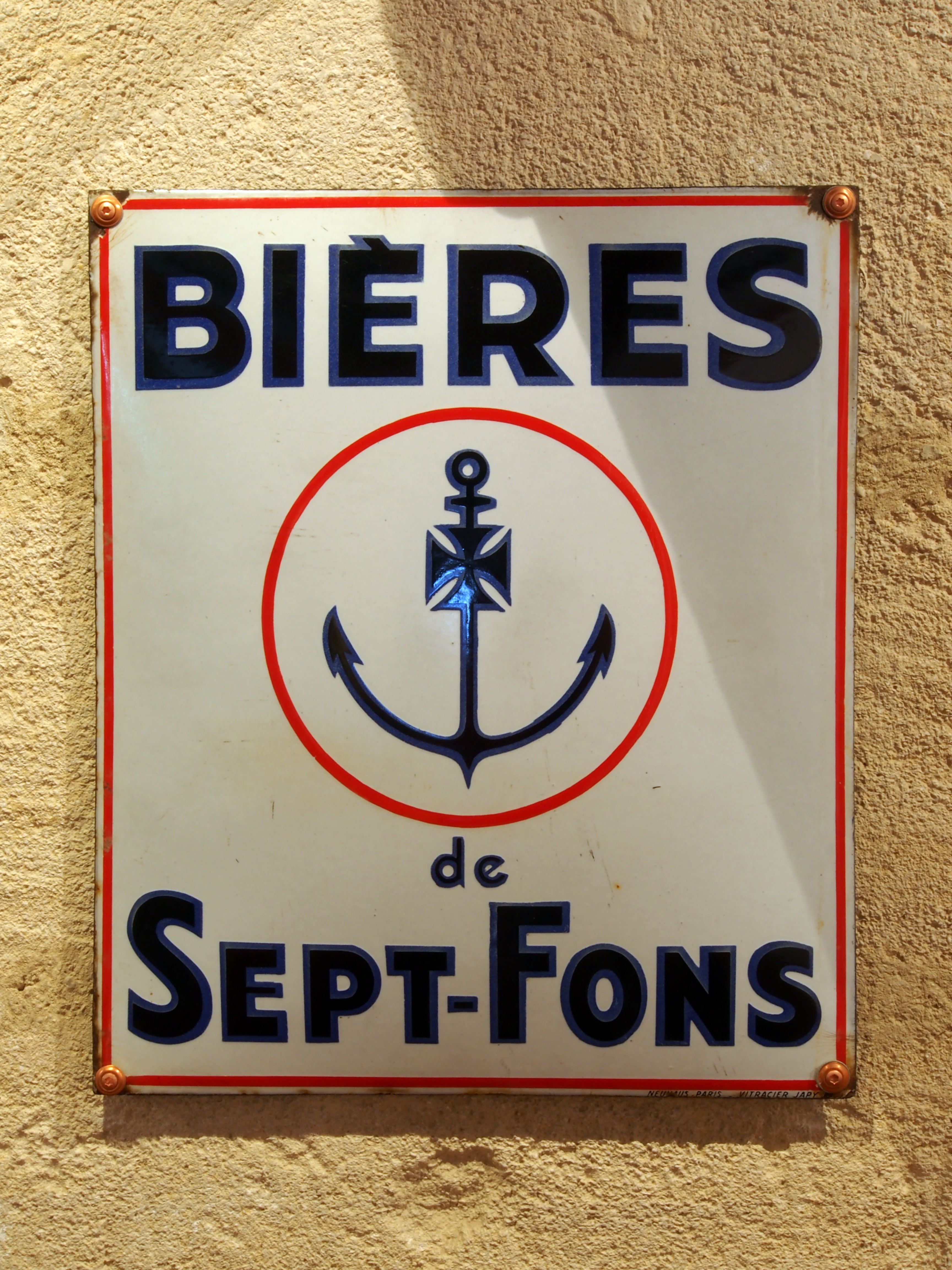 Biières Sept-Fons , enamel advertising sign at the Musée Européen de la Bière.